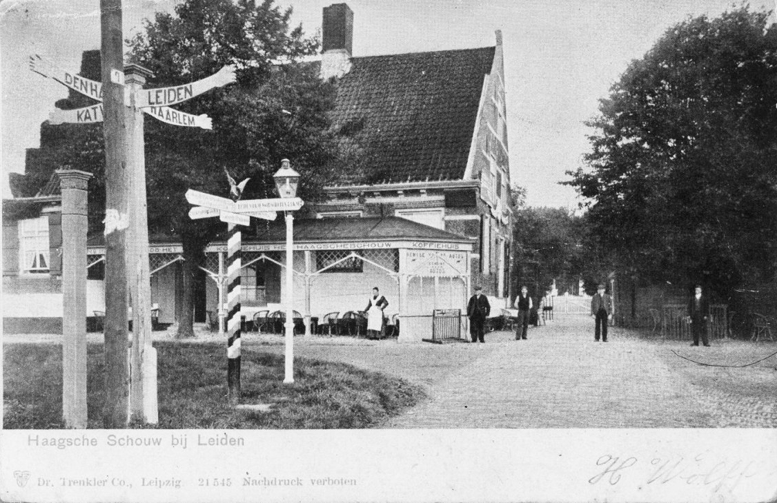 Diversen: Haagsche Schouw, aanzicht